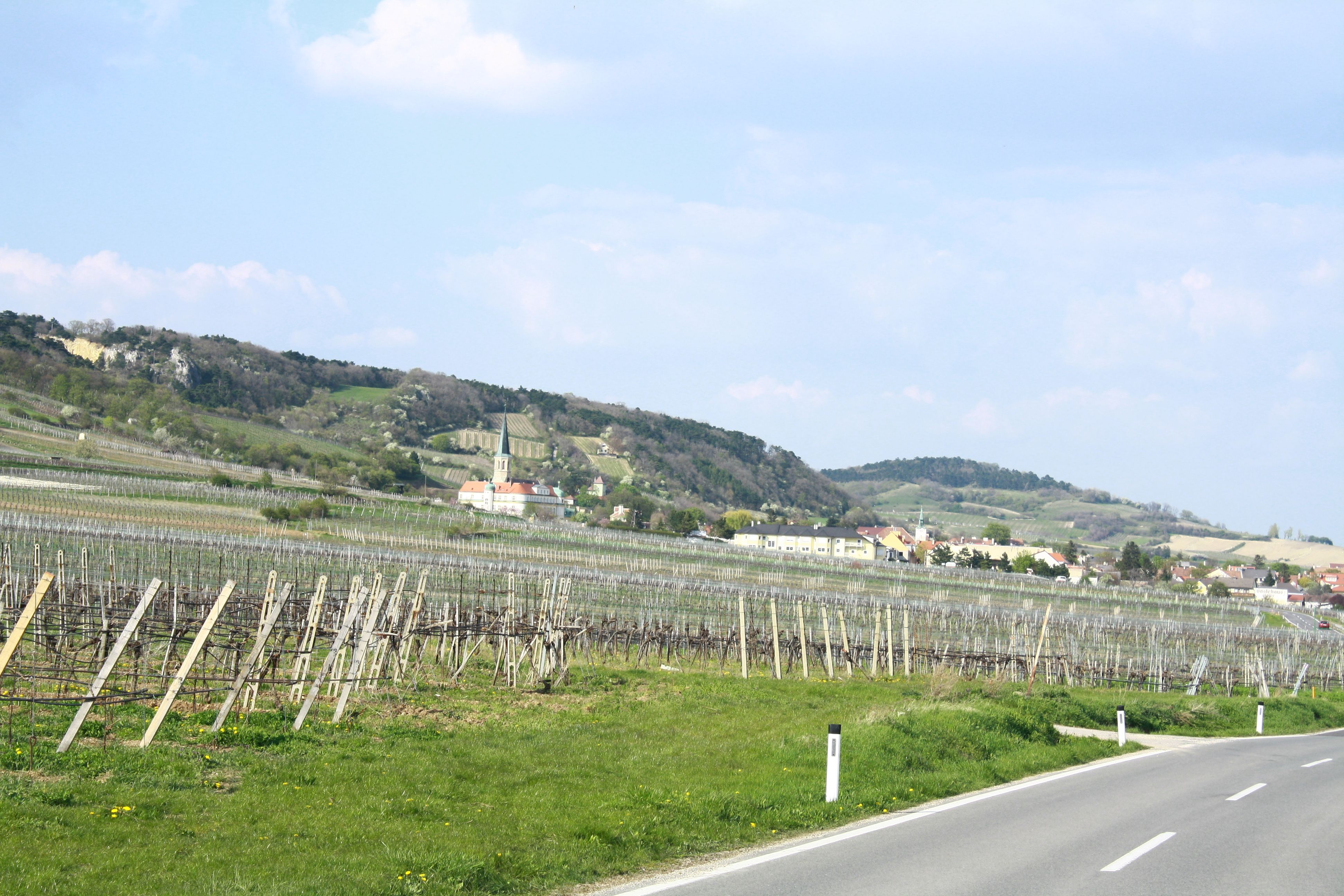 Blick nach Gumpoldkirchen von der Weinstraße von Pfaffstätten kommend